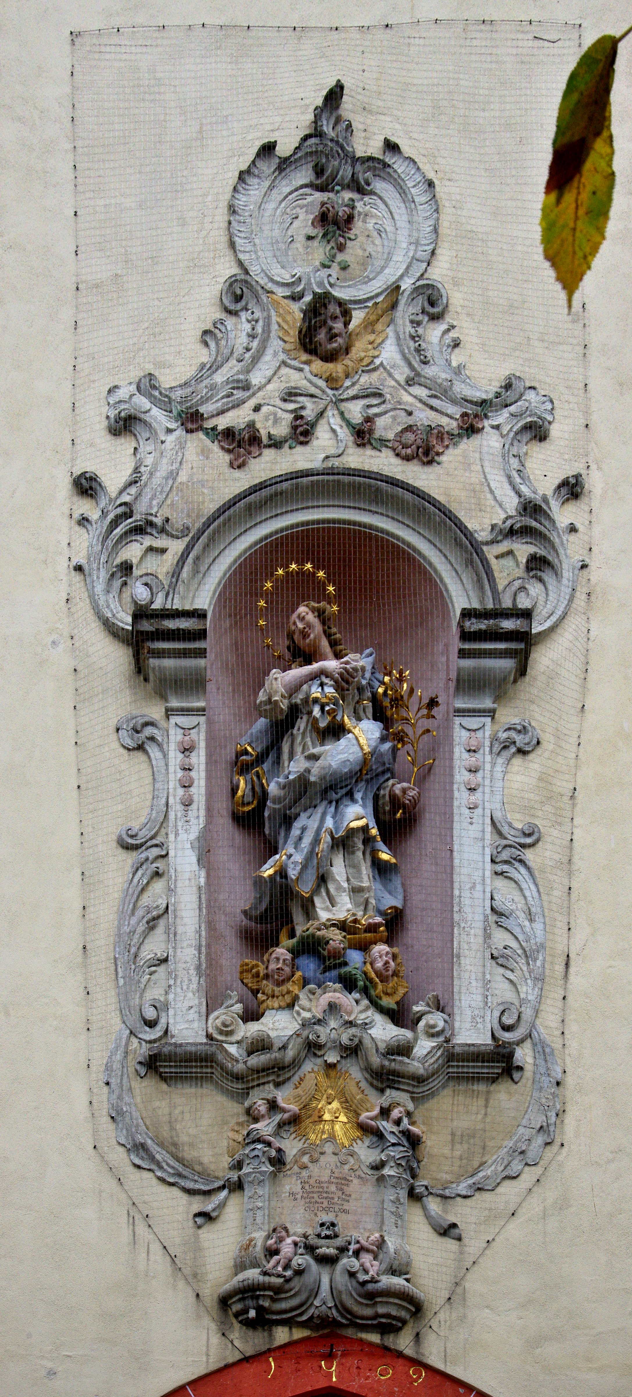 Bilder des Innenraums der Kirche St. Mariä Himmelfahrt in Kirchhofen, einem Teil der Gemeinde von Ehrenkirchen.